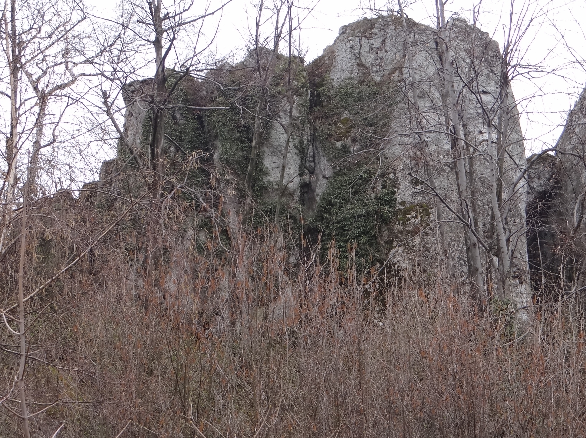 Skały Baraszki w grupie Skał Chochołowych w Dolinie Szklarki